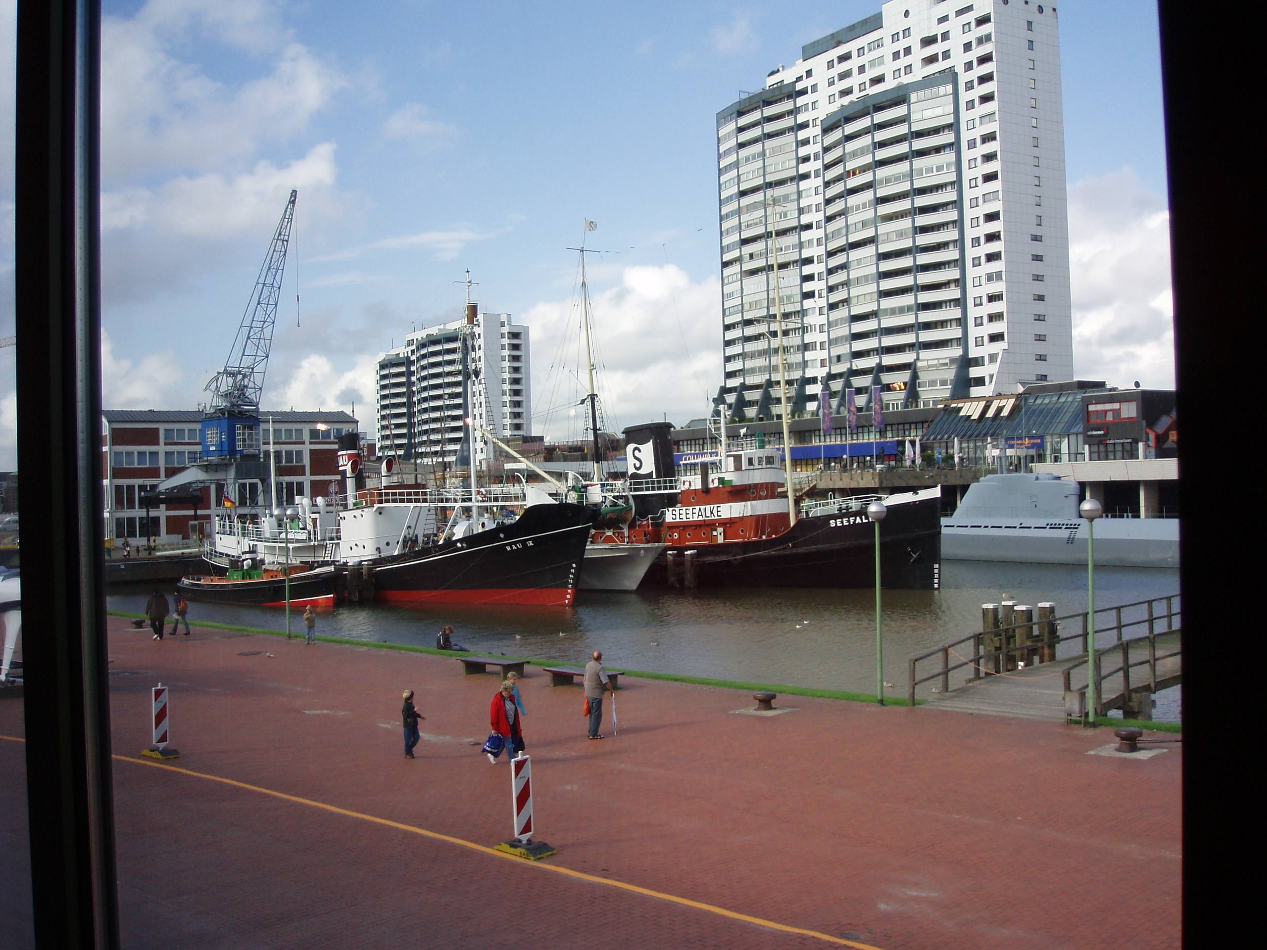 Blick vom Deutschen Schiffahrtsmuseum Richtung Columbuscenter